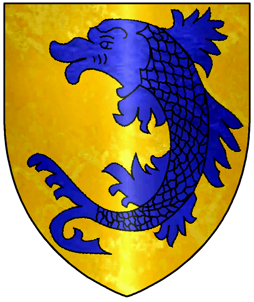 Blason des Dauphins d'Auvergne